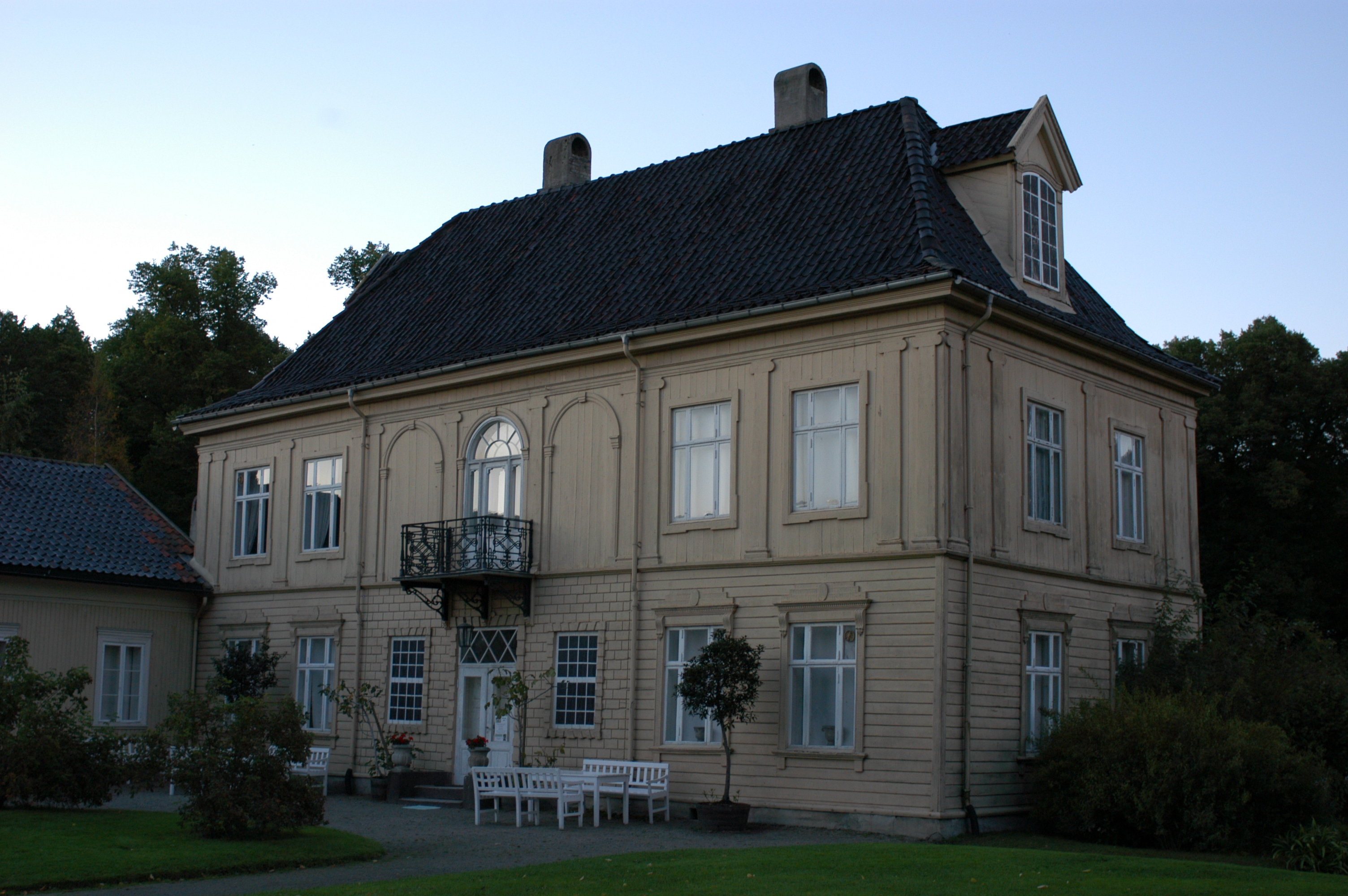 Gulskogen gård